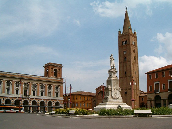 Forlì: Piazza Aurelio Saffi